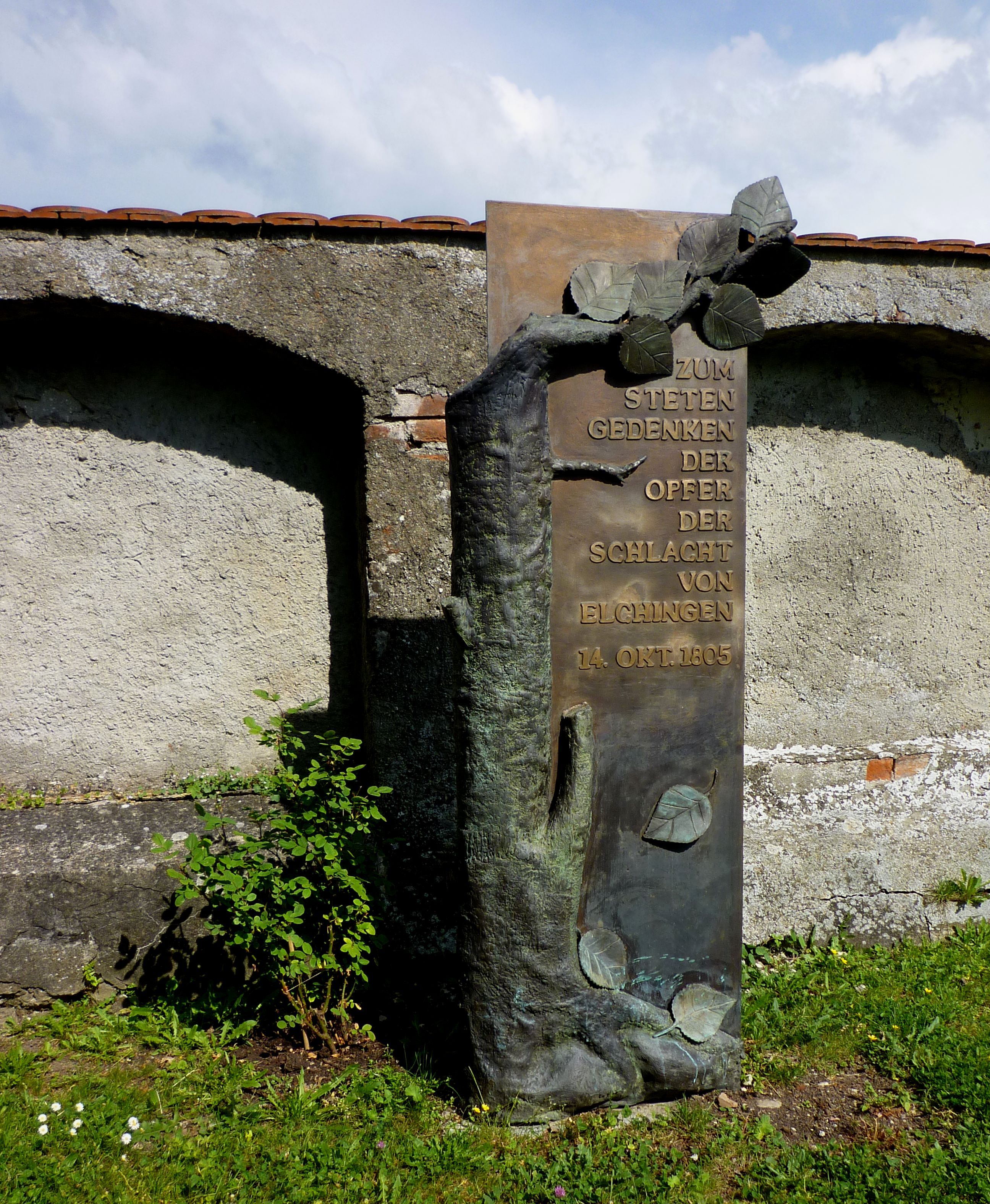 Elchingen - Denkmal an die Schlacht bei Oberelchingen